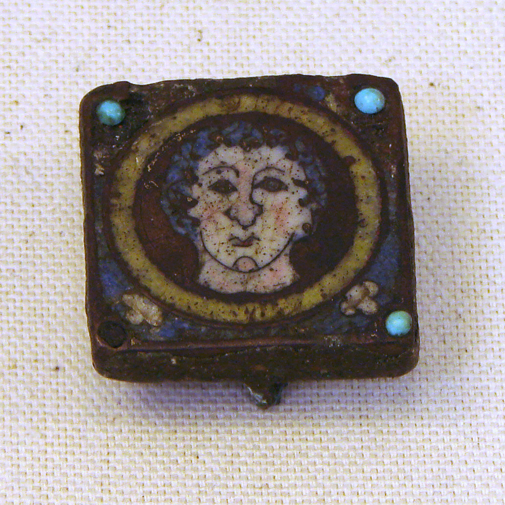 Fibule, époque carolingienne. Email sur métal cuivreux, or et turquoise. Trouvée à Chalandry, la Terrière. Musée de Laon.